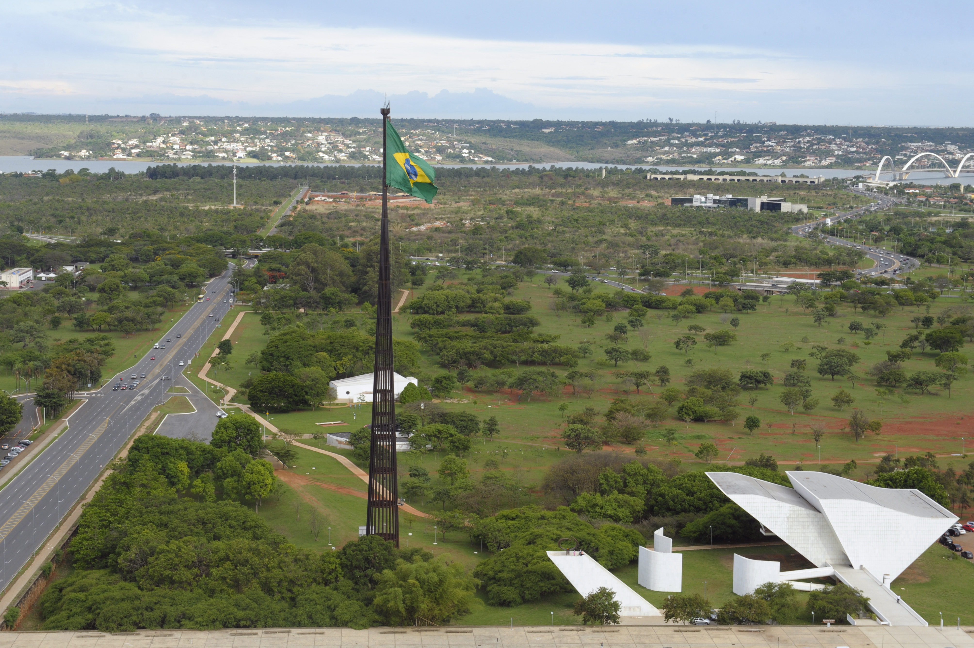 BIE - Banco de imagens externas: Vista aérea da Bandeira Nacional. Uma gigantesca bandeira nacional pende continuamente no mastro da Praça dos Três Poderes, em Brasília. Feita de náilon paraquedas, ela tem 20 metros de comprimento e 14 metros de altura. São 280 metros quadrados. Desde 2000, uma empresa de Cascavel (PR) confecciona a bandeira, que é trocada todo mês. Diz Sérgio Tomasetto, proprietário da fábrica: - Grande parte das bandeiras tem o preto e o vermelho, que indicam que o país enfrentou guerra. A nossa, não. O verde e o amarelo formam uma combinação singular, que torna a nossa bandeira bela, emocionante e inconfundível. Foto: Jefferson Rudy/Agência Senado